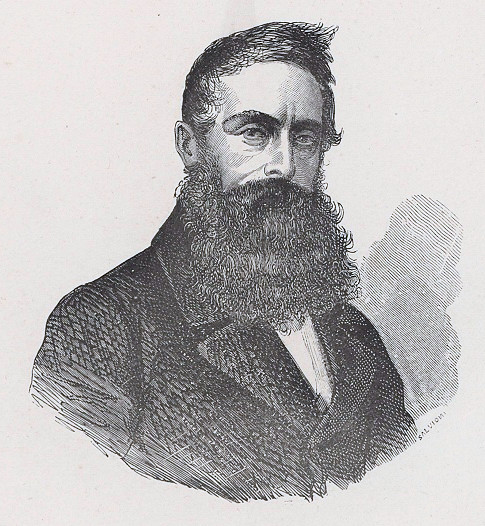 Ritratto di Luigi Barbiano di Belgioioso